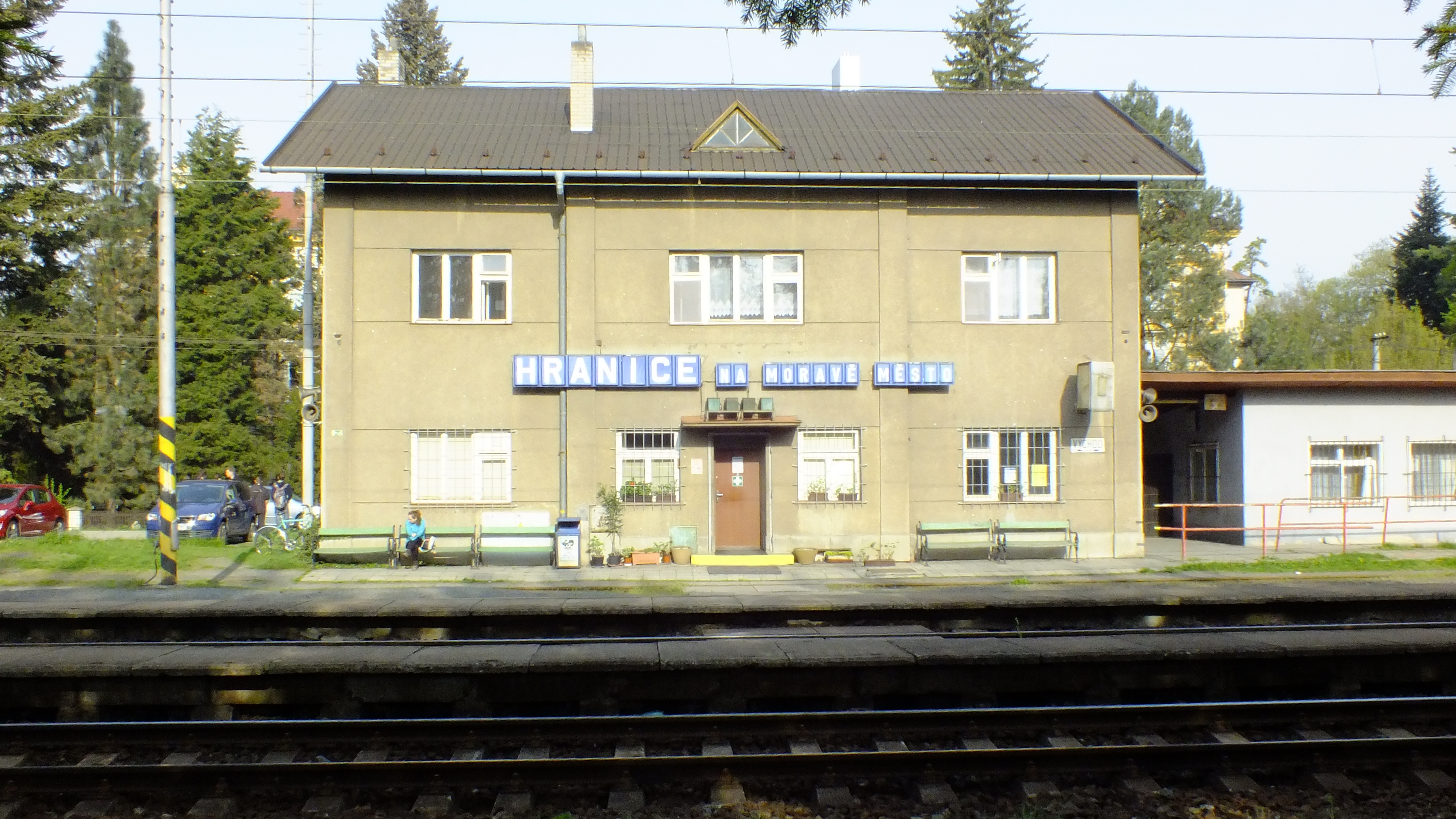 Staniční budova